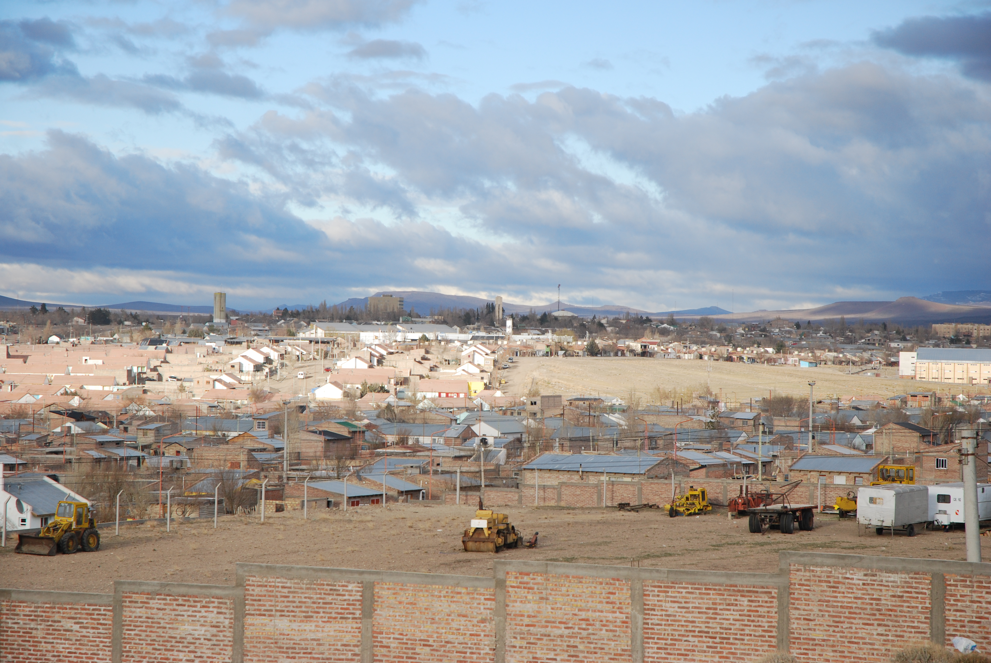 Vista de Zapala (Provincia del Neuquen) desde el ingreso norte.